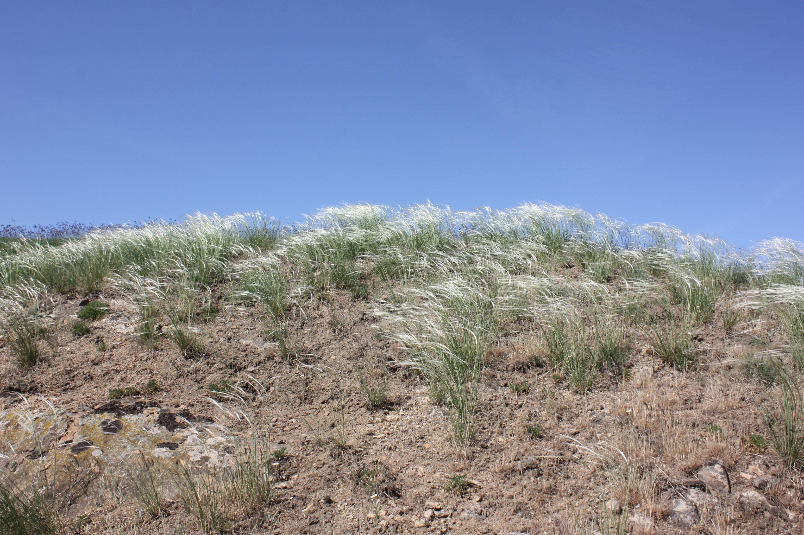 «Гренівський», Ульяновський район